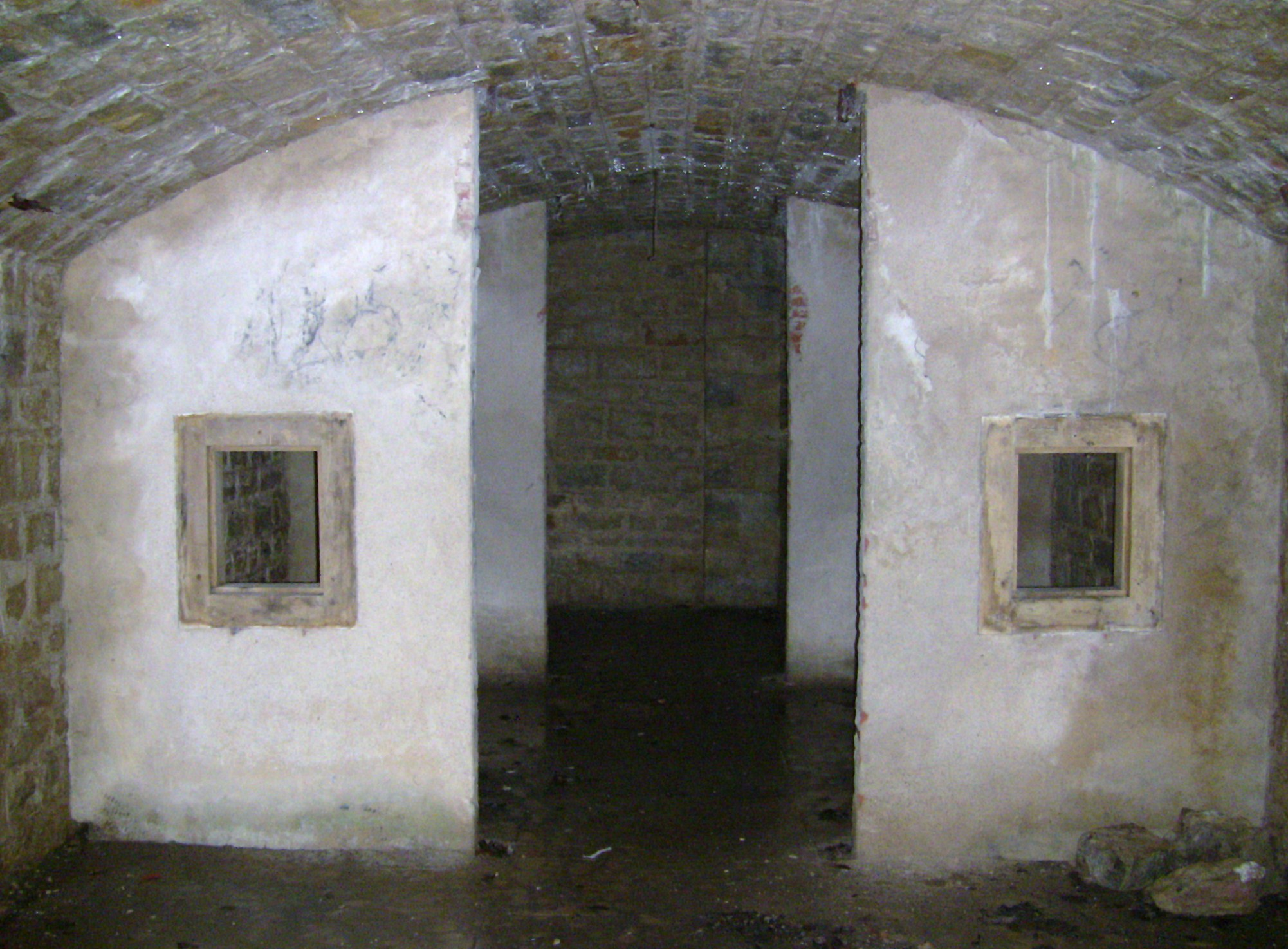 Intérieur de la chambre 2 de la batterie centrale du fort de Planoise, à Besançon (Doubs, France).